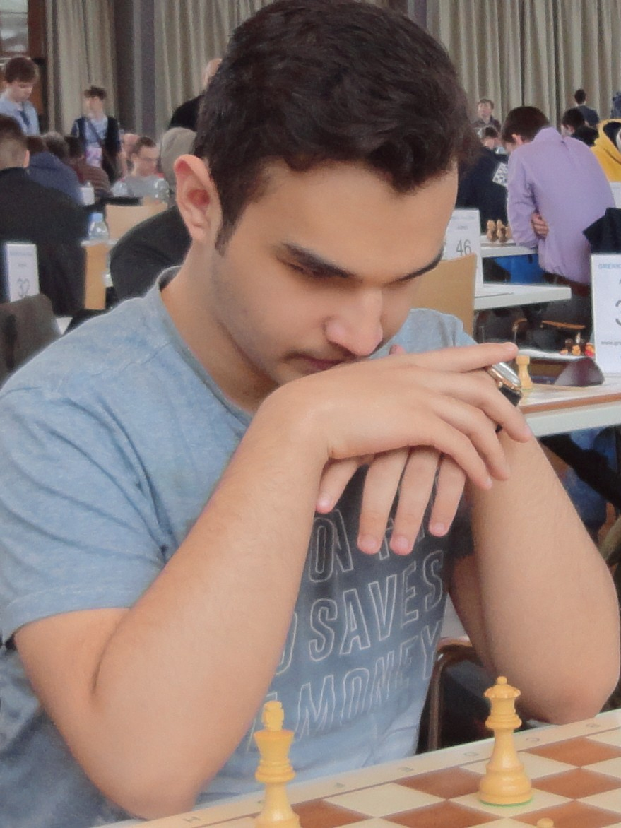 Seyed Mohammad Amin Tabatabaei, Grenke Chess Open 2016 in Karlsruhe.